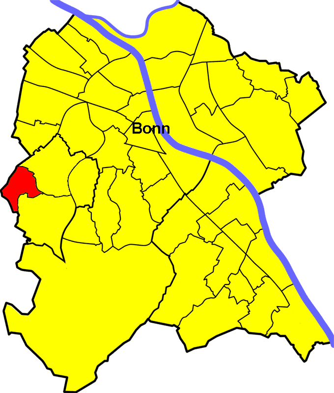 Lage Medinghoven in Bonn